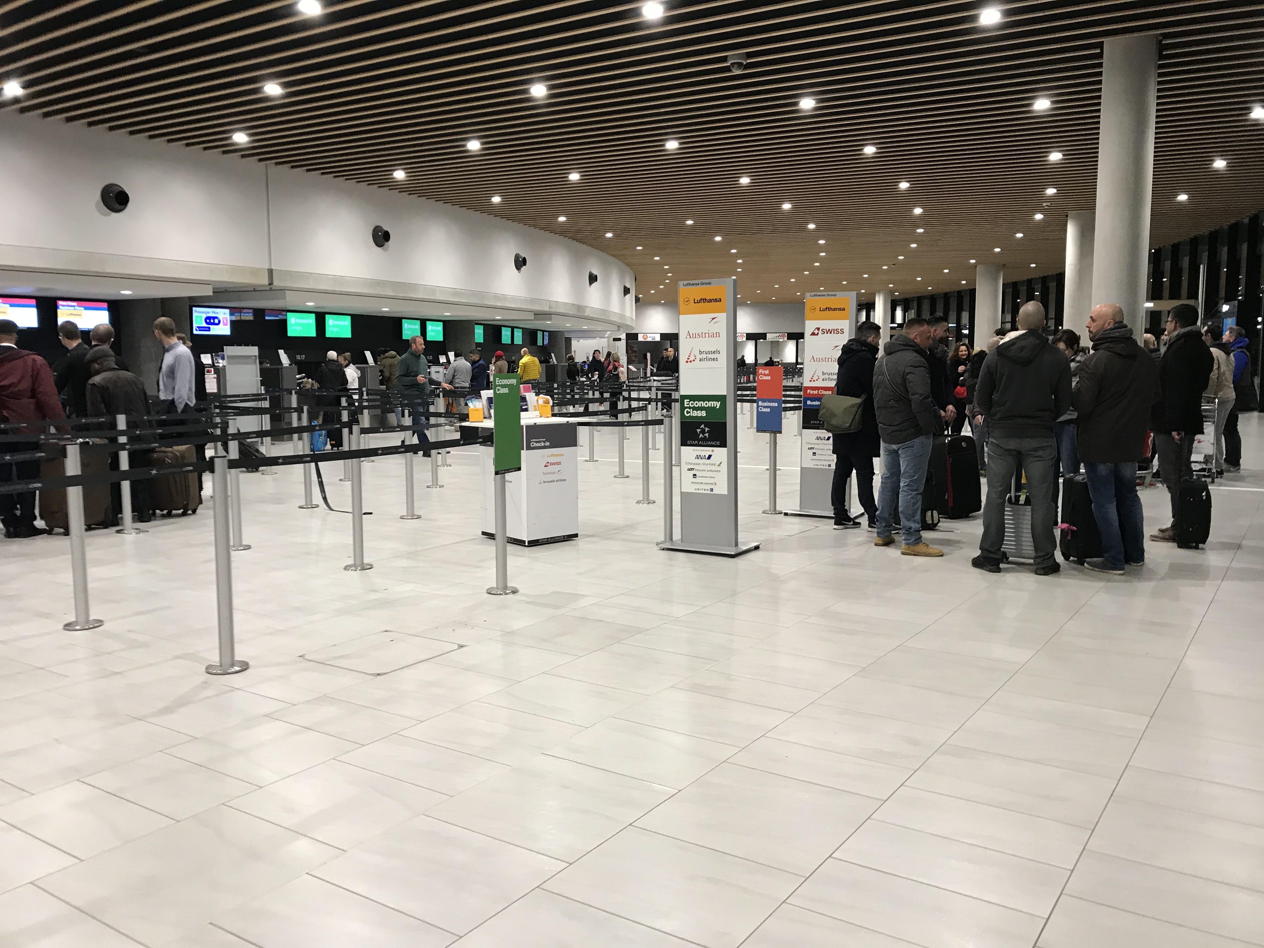 Aéroport de Lyon-Saint-Exupéry (terminal 1B) en mars 2018.